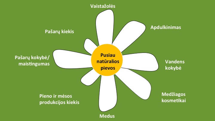 Ekosisteminės paslaugos pusiau natūraliose pievose